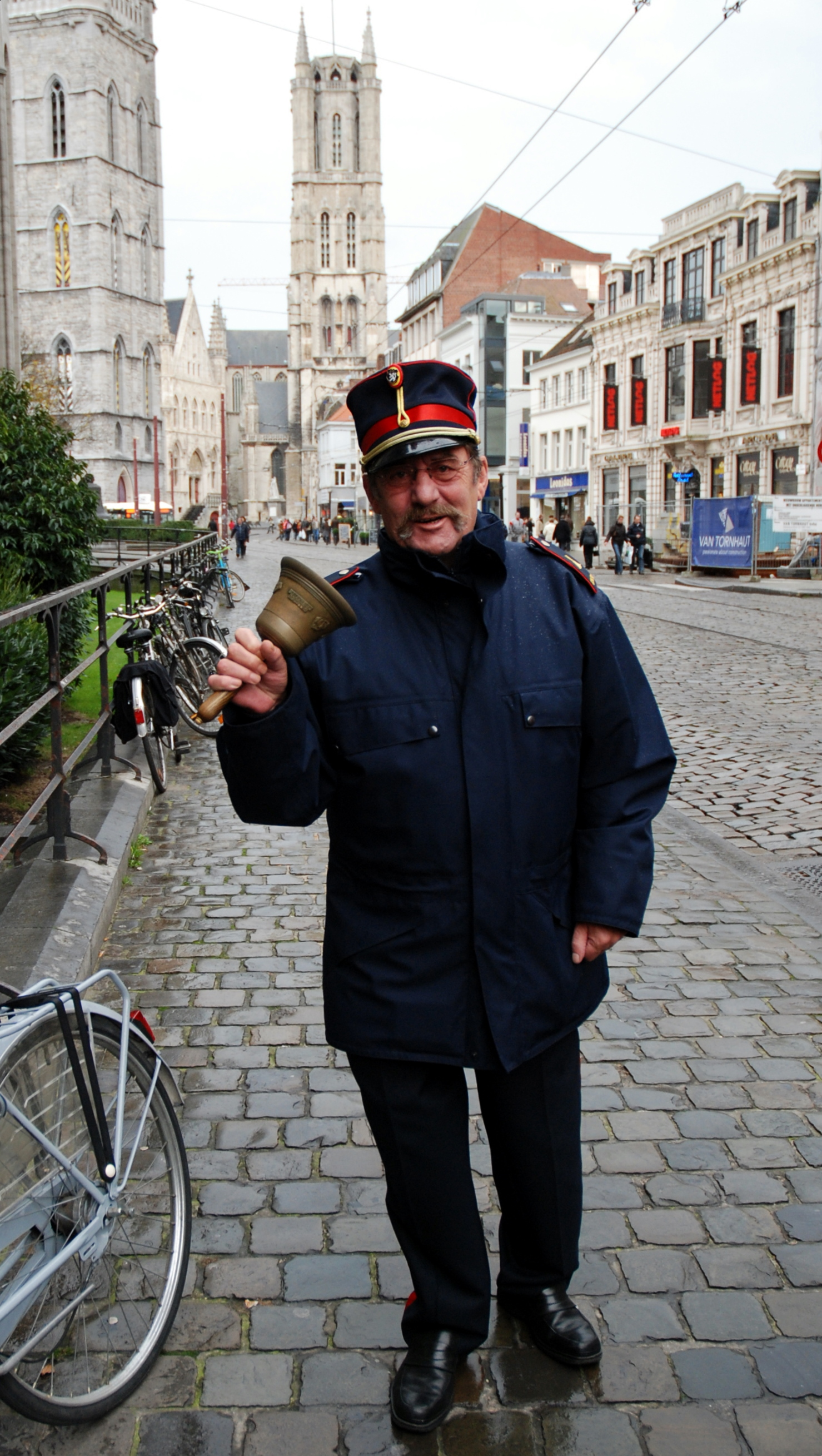 Stadsomroeper, in Gent (België) "belleman" genoemd